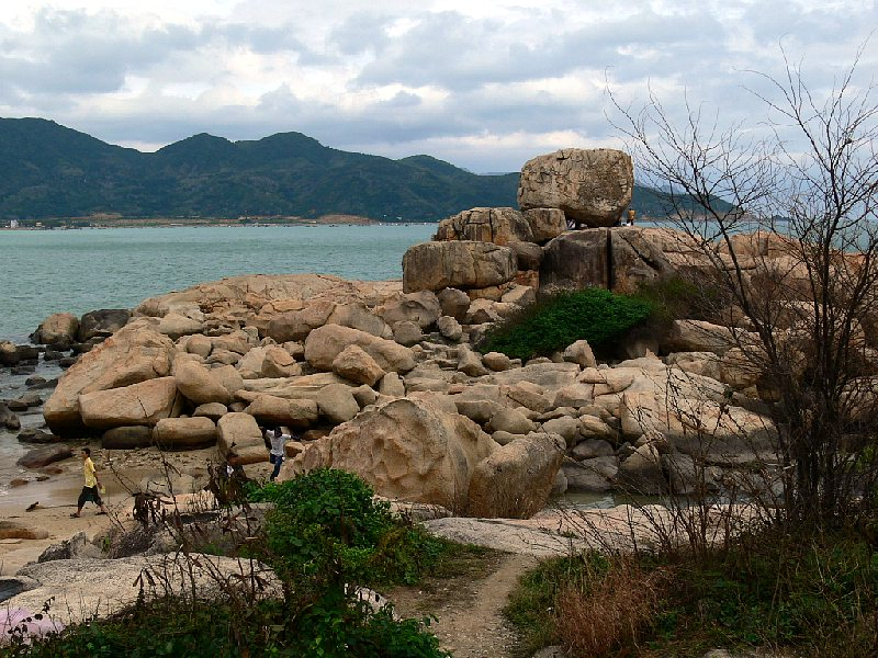 Kap Hon Chong